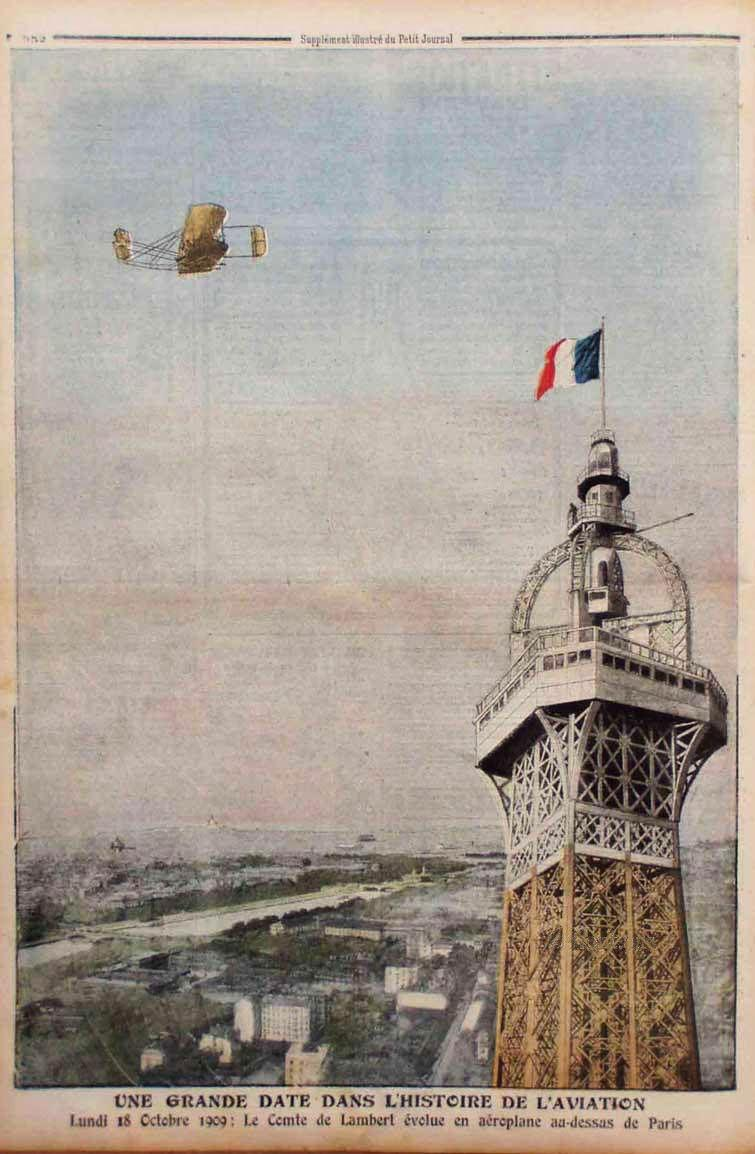 Carlos Alexandre, conde de Lambert sobrevoando a Torre Eiffel no biplano Wrigth, 18 de outubro de 1909. Le Petit Journal, Paris, França.